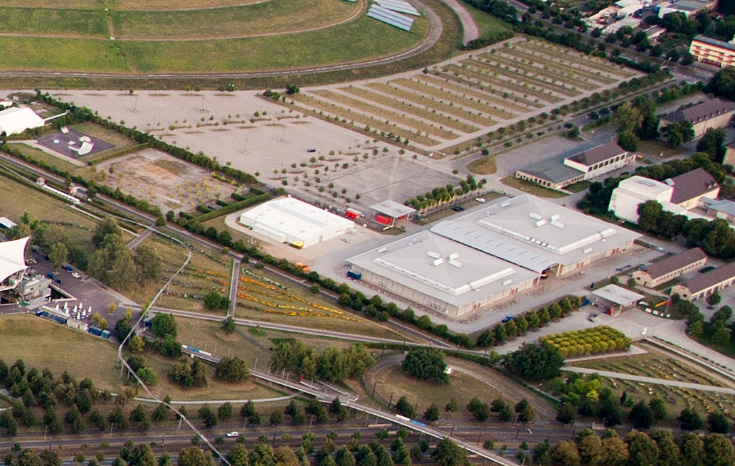 Messehallen in Magdeburg, Luftansicht